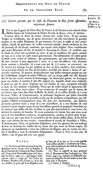 Ordonnance royale du 3 juillet 1315 Source : Ordonnances des Roys de France de la troisième race, recueillies par ordre chronologique. Avec des renvoys des unes aux autres, des sommaires, des observations sur le Texte, & cinq Tables - Premier Volume Contenant ce qu'on a trouvé d'Ordonnances imprimées, ou manuscrites, depuis HUGUES CAPET, jusqu'à la fin du Règne de CHARLES LE BEL Par M. De LAURIERE ancien Avocat au Parlement A PARIS - DE L'IMPRIMERIE ROYALE - M. DCCXXIII